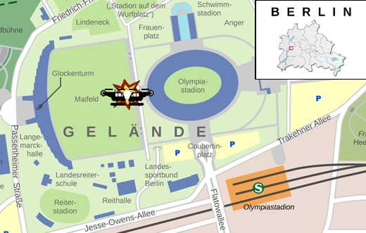 Unglücksort des Flugunfalls am Berliner Olympiastadion